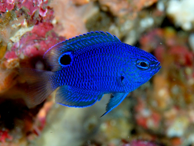 ナガサキスズメダイ Pomacentrus nagasakiensis